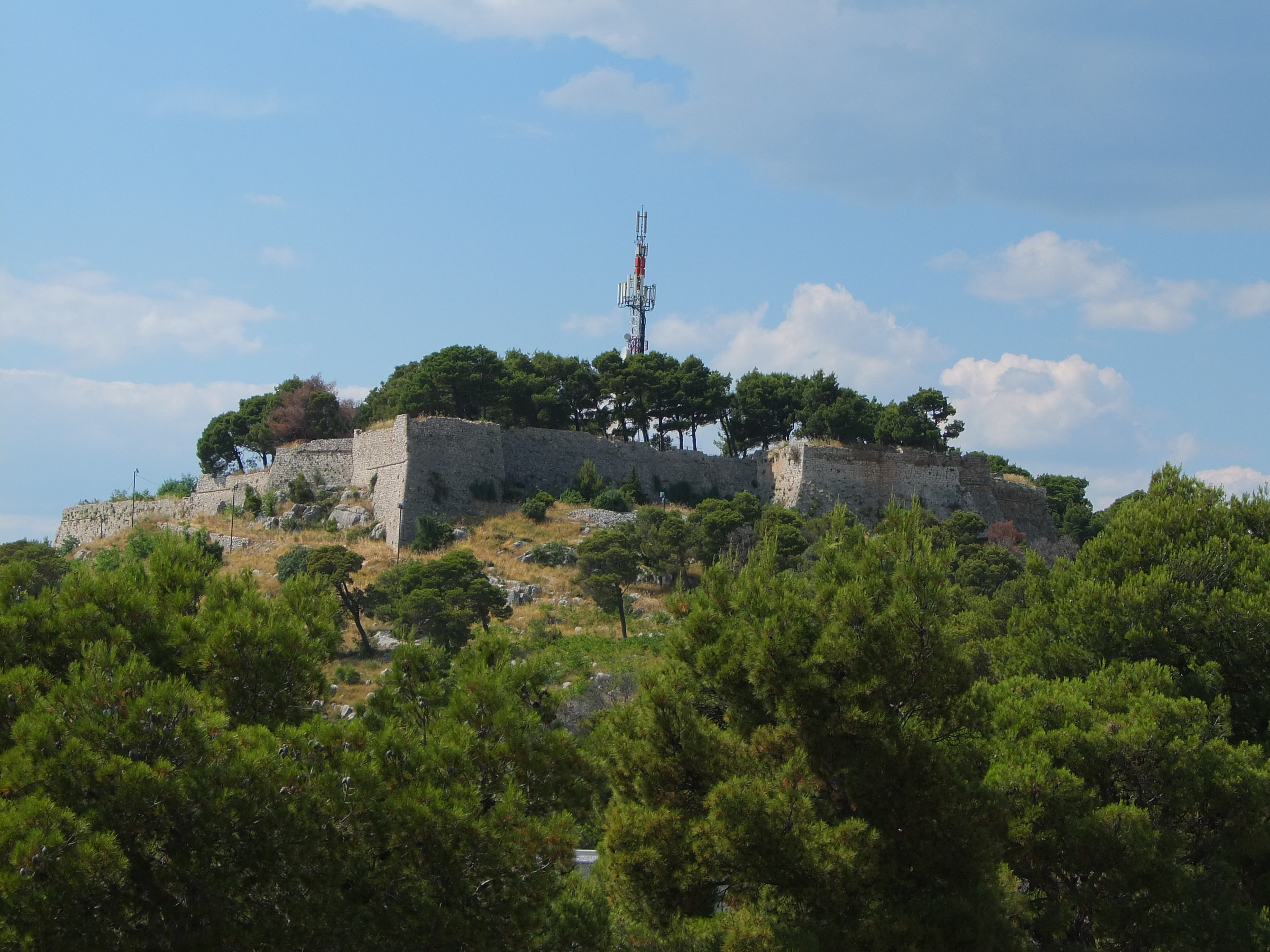 Srpskohrvatski / српскохрватски: Pogled na tvrđavu sv. Ivana s tvrđave Šubićevac